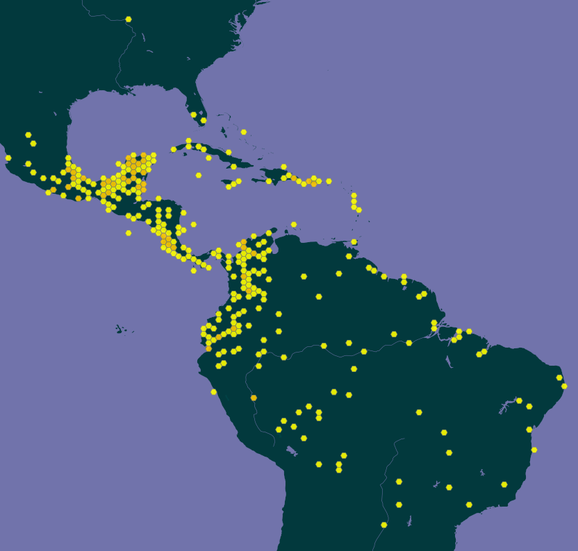 Mapa GBIF de distribuição de Crescentia cujete